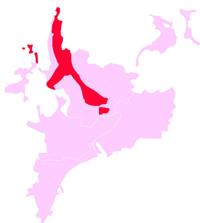 Illyicha_mp_mar